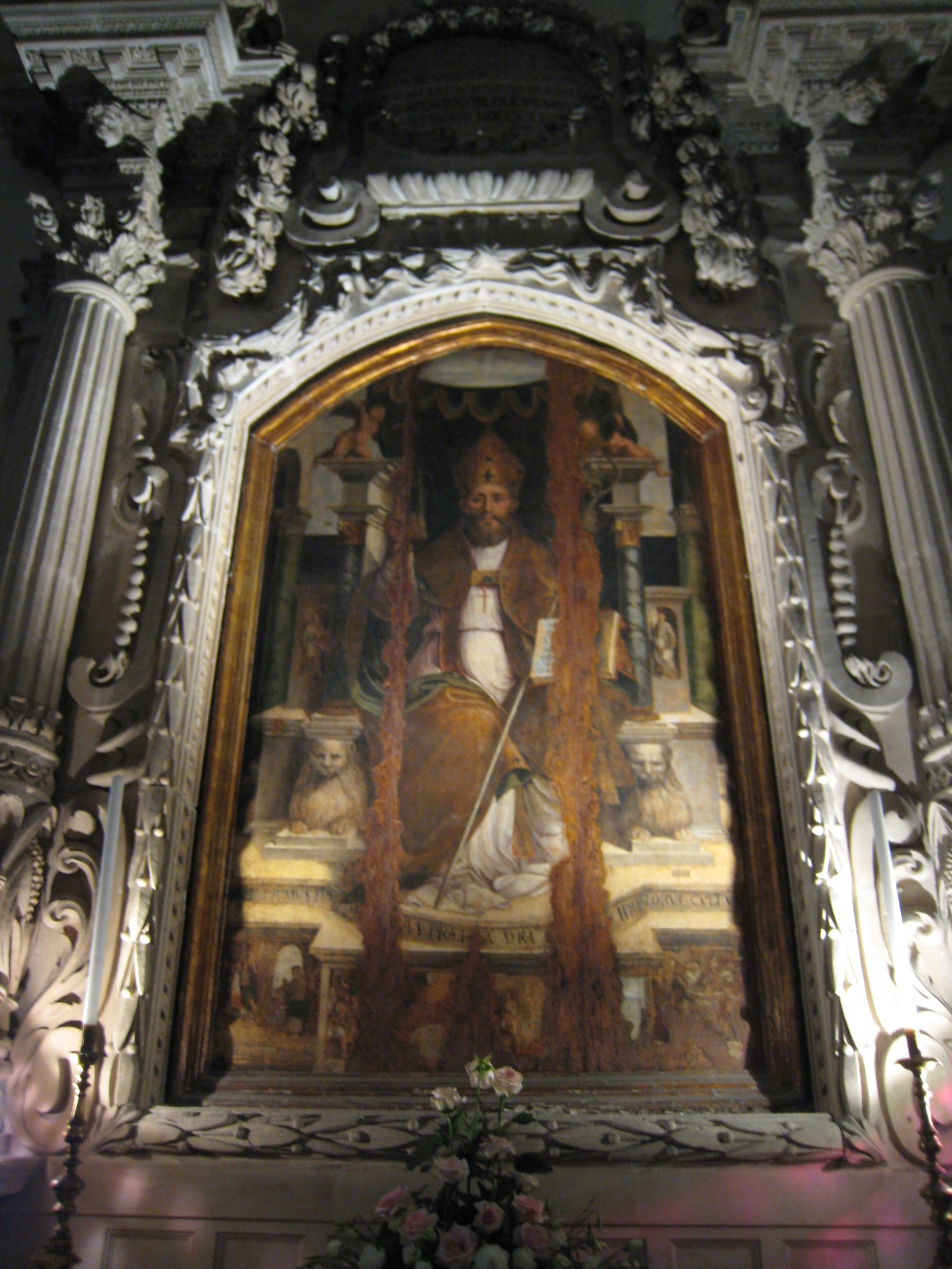 Dipinto Duomo di Siracusa